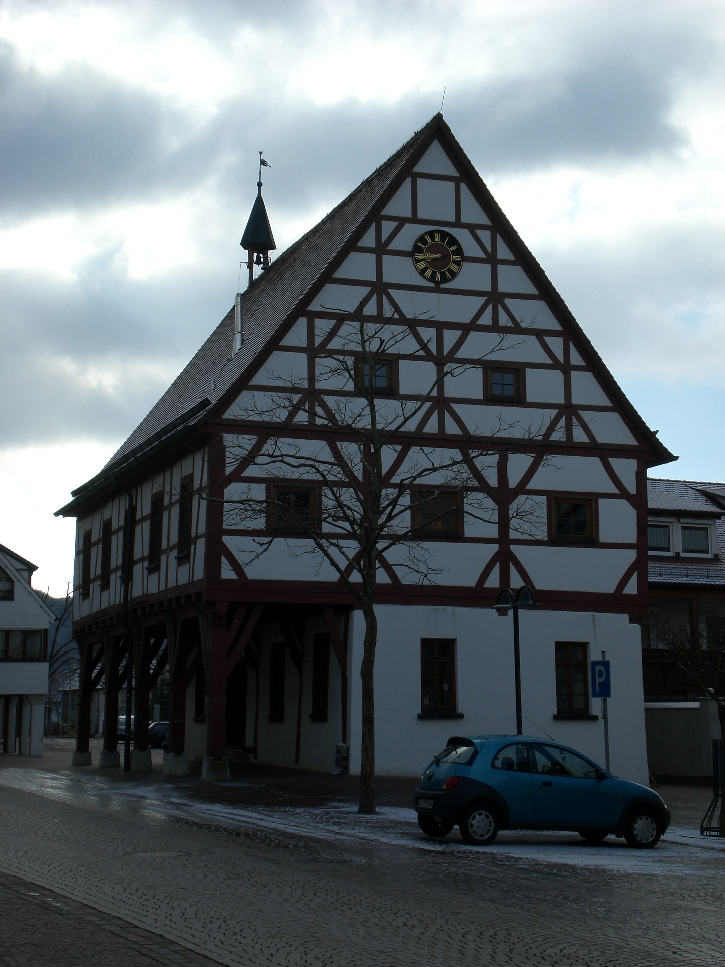 Altes Rathaus Schelklingen